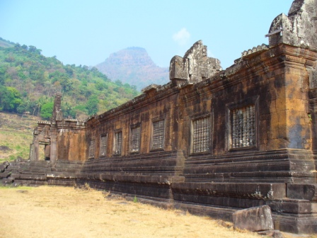 Wat Phu au Laos, vue du palais du Nord aussi nommé palais des Femmes.